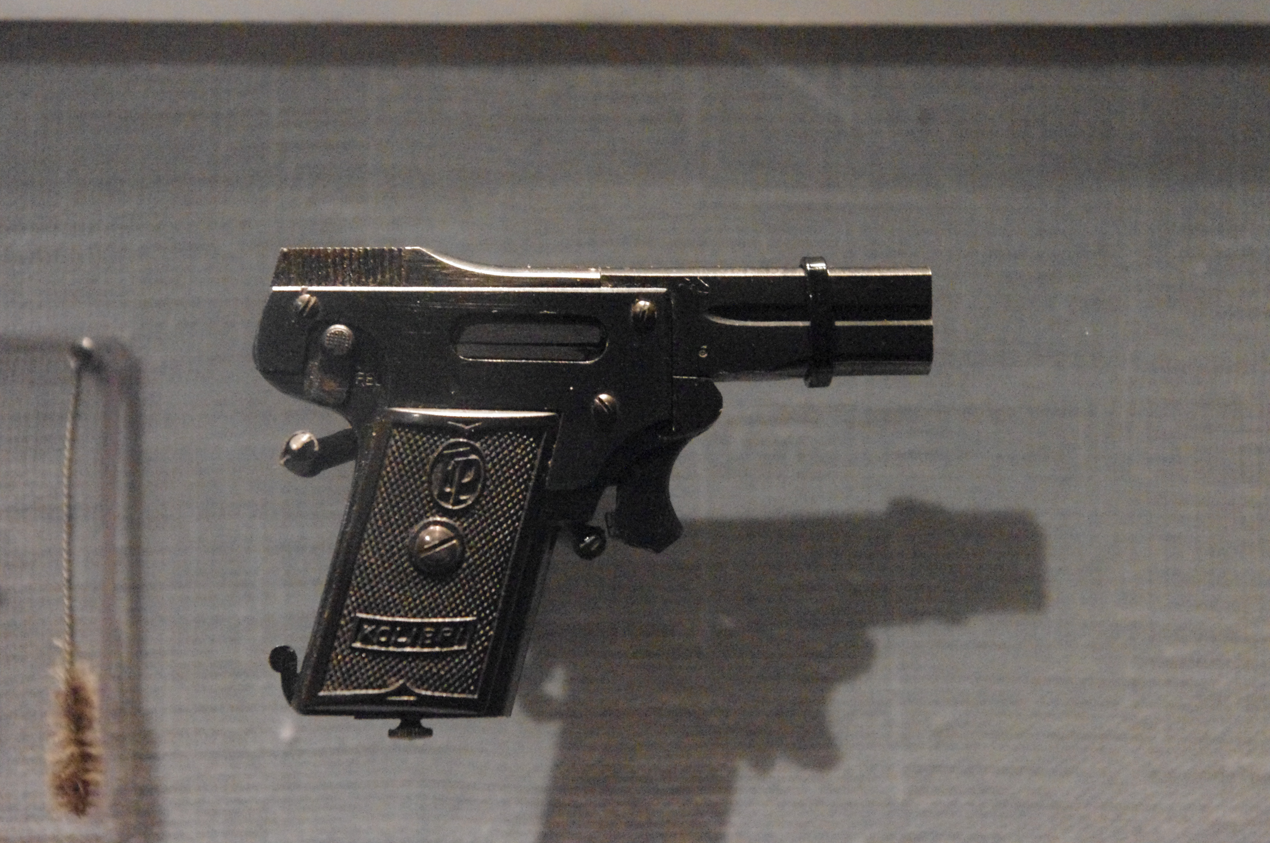 Världens minsta automatpistol. Konstruerad av klockmakaren Franz Pfannl och använd från 1914. Formatet är litet och modellen var tänk att användas i självförsvar av damer.